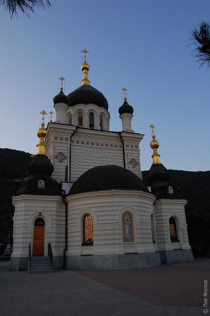 Церковь Воскресения Христова